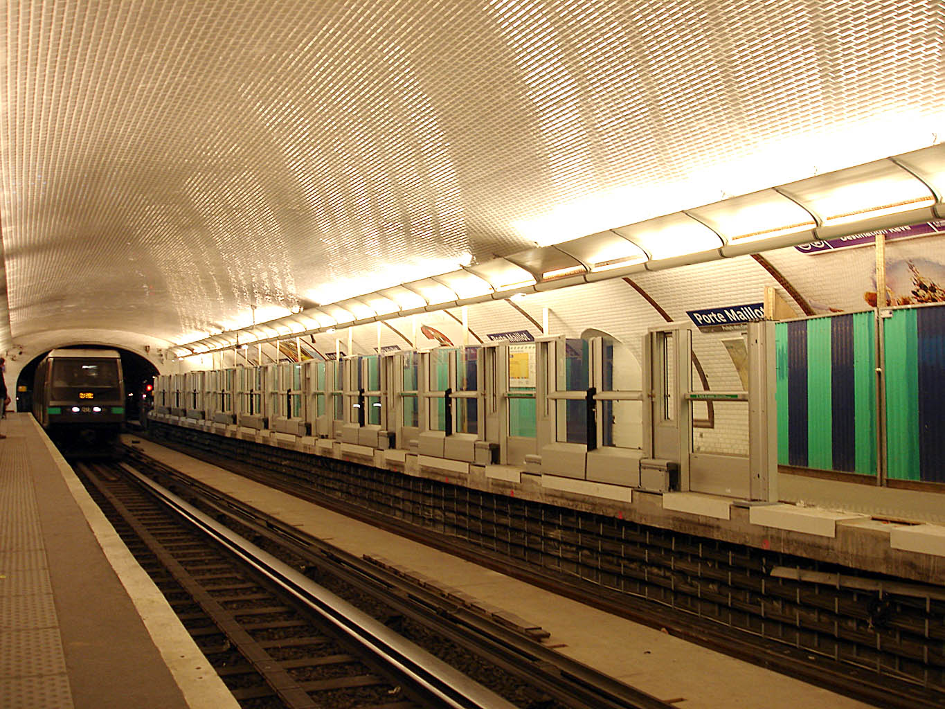 Station Porte Maillot de la ligne 1 du métro de Paris, France.